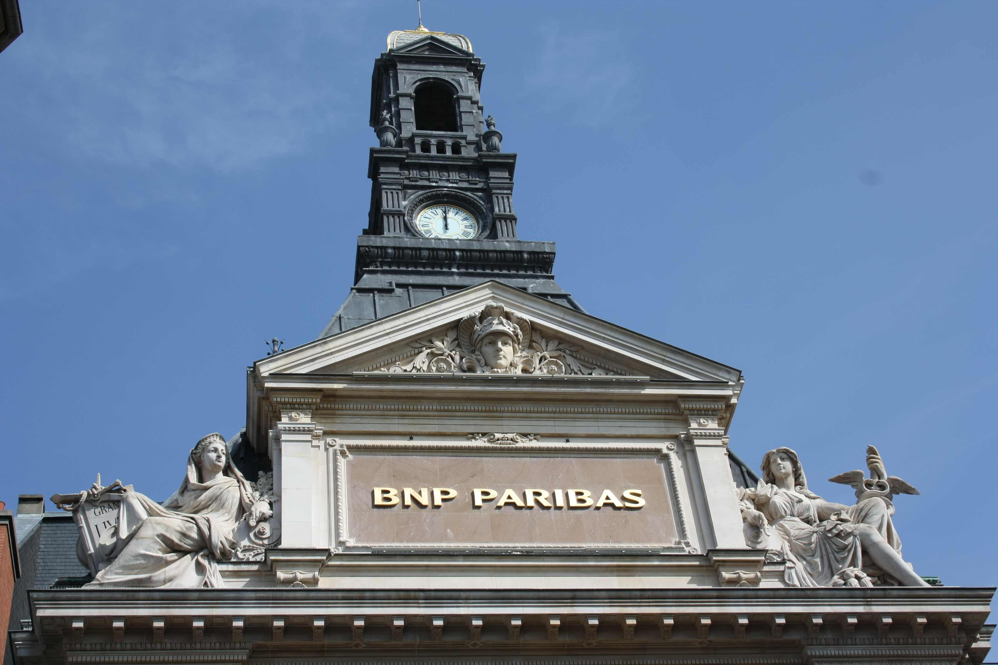 Bankgebäude der BNP Paribas in Paris, gebaut für Comptoir National d'Escompte de Paris, 14-20 rue Bergère